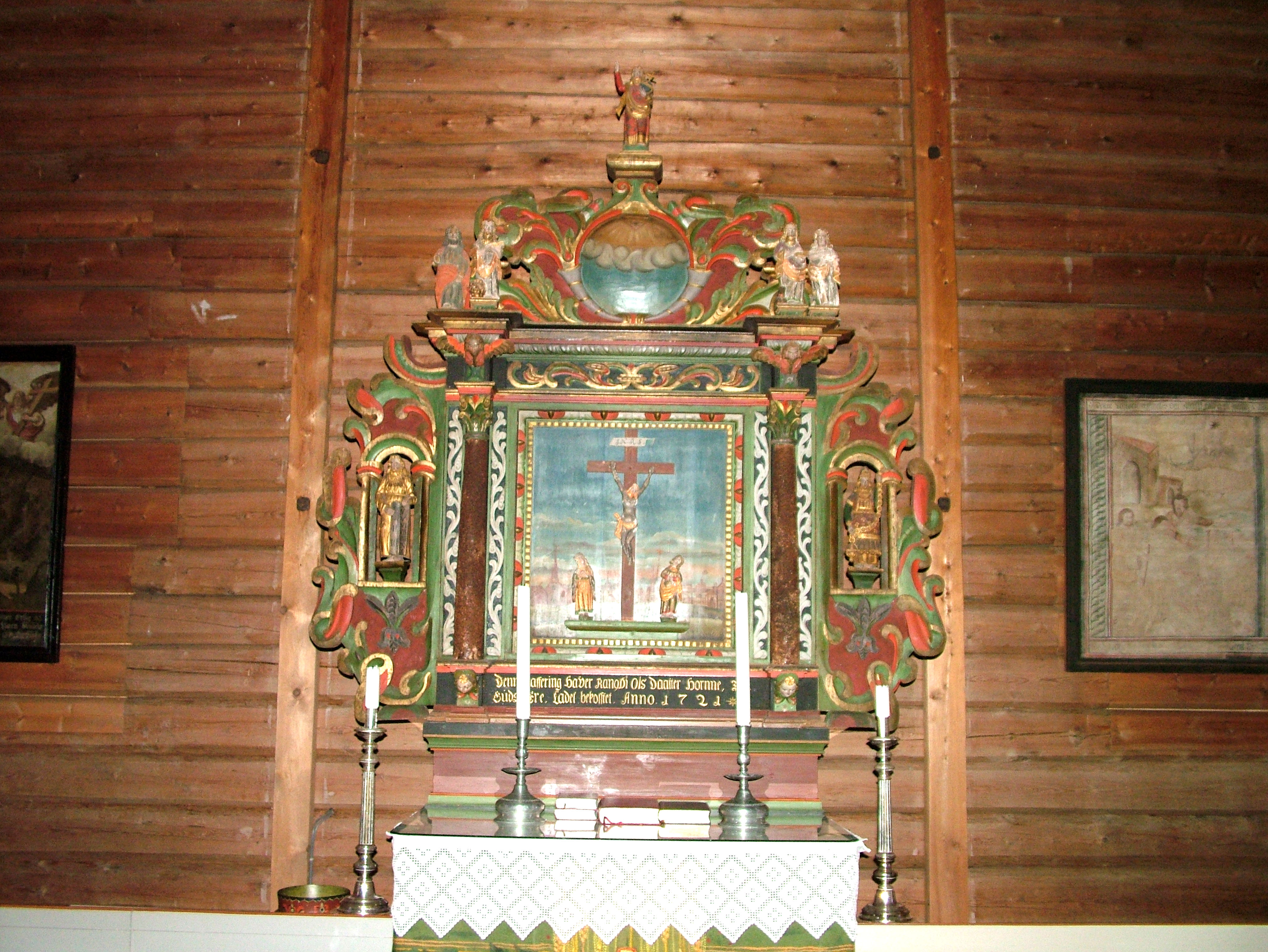 Altertavla i Vallset kirke er fra 1721 og er antagelig laget av Johannes Larsen Skraastad, Vang. Motiv: Kristus på korset, mellom Maria og Johannes.